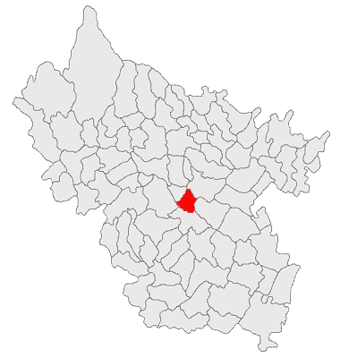 Categorie:Hărţi ale judeţului Buzău